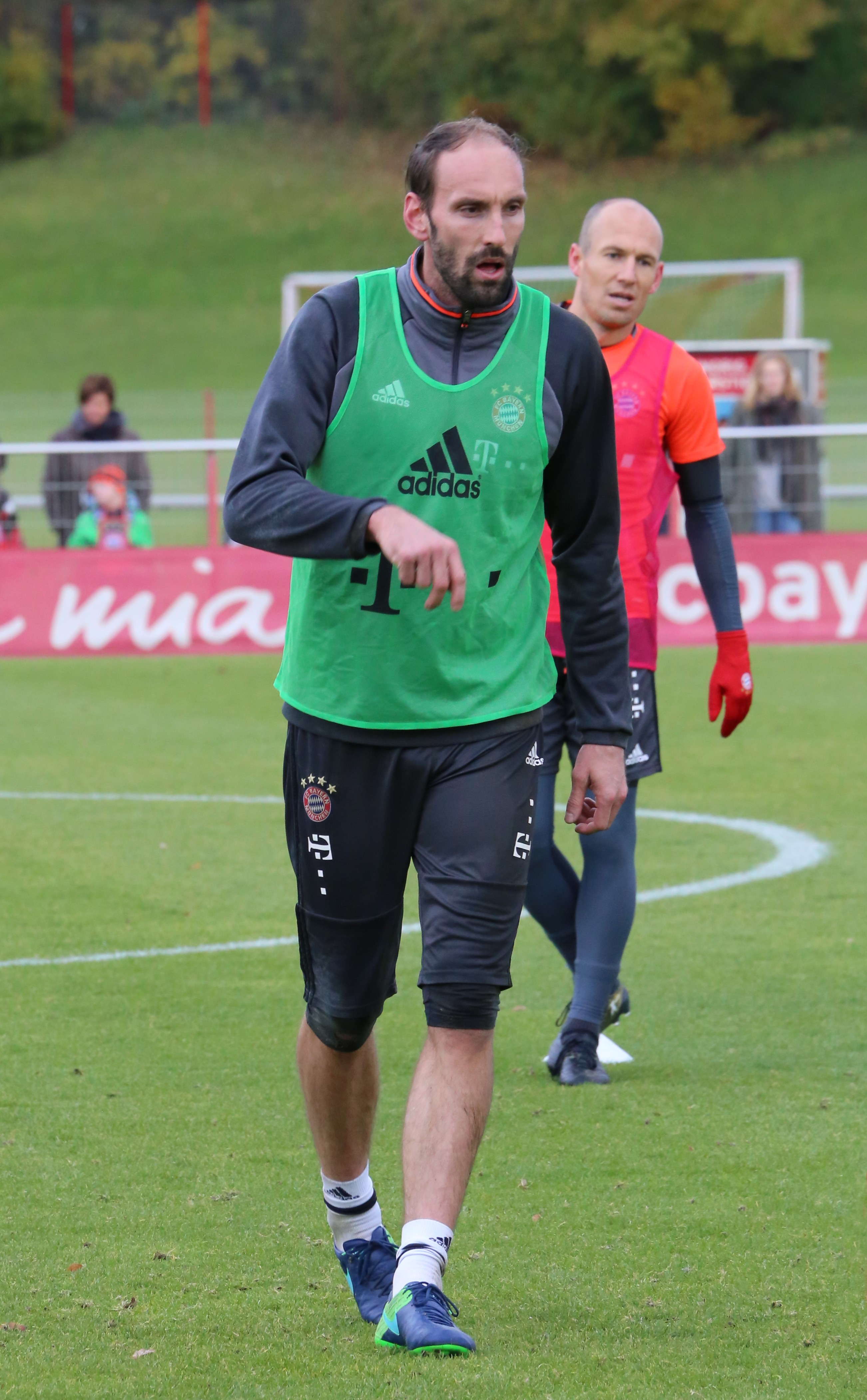 Tom Starke beim Training auf dem Gelände des FC Bayern München (November 2016)